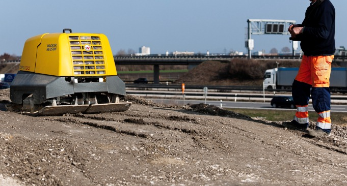 Vibrationsplatte Wacker Neuson DPU 130 mit Infrarot Fernsteuerung